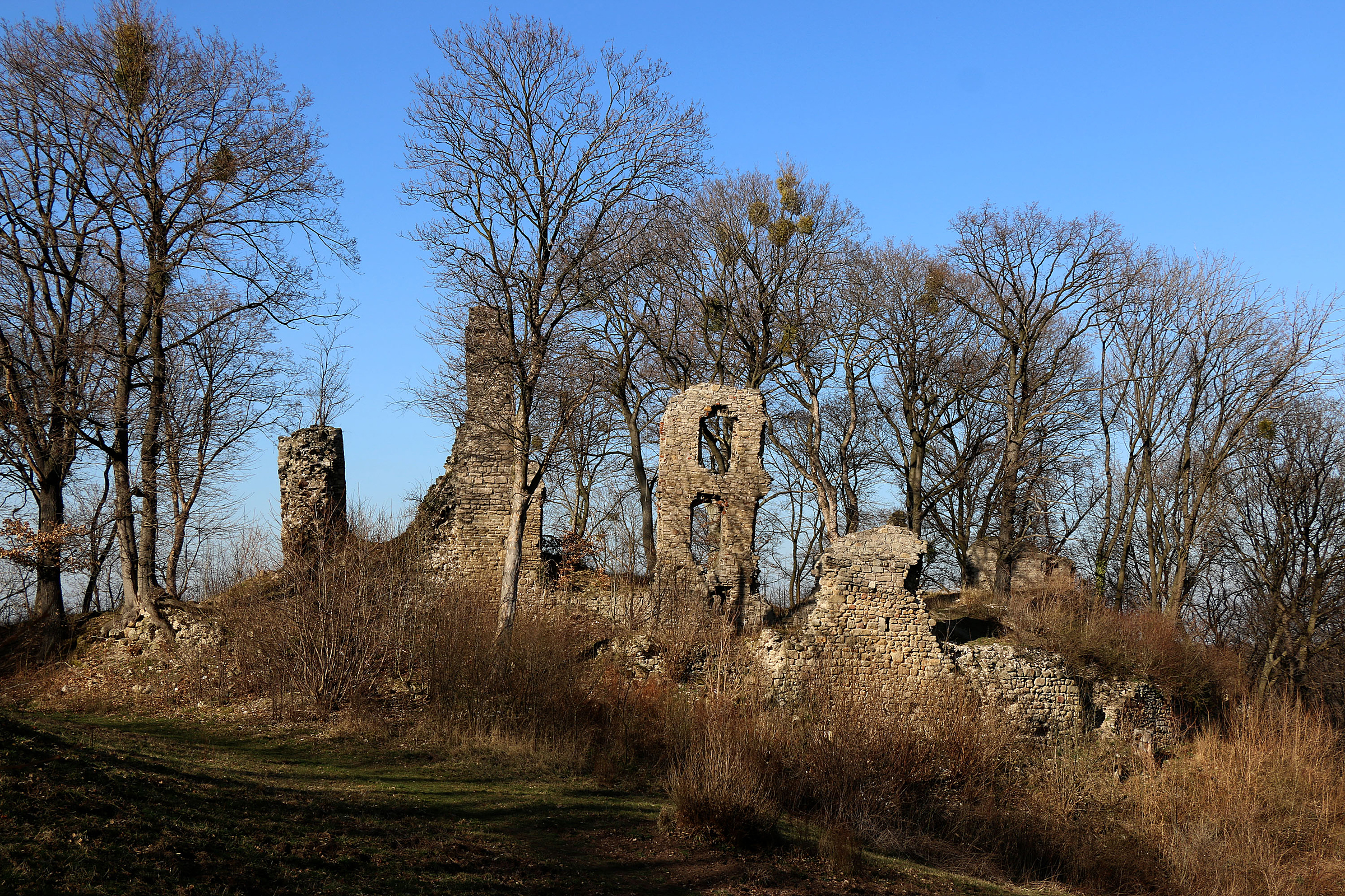 Ruine der Burg Stecklenburg bei Stecklenberg, Harz